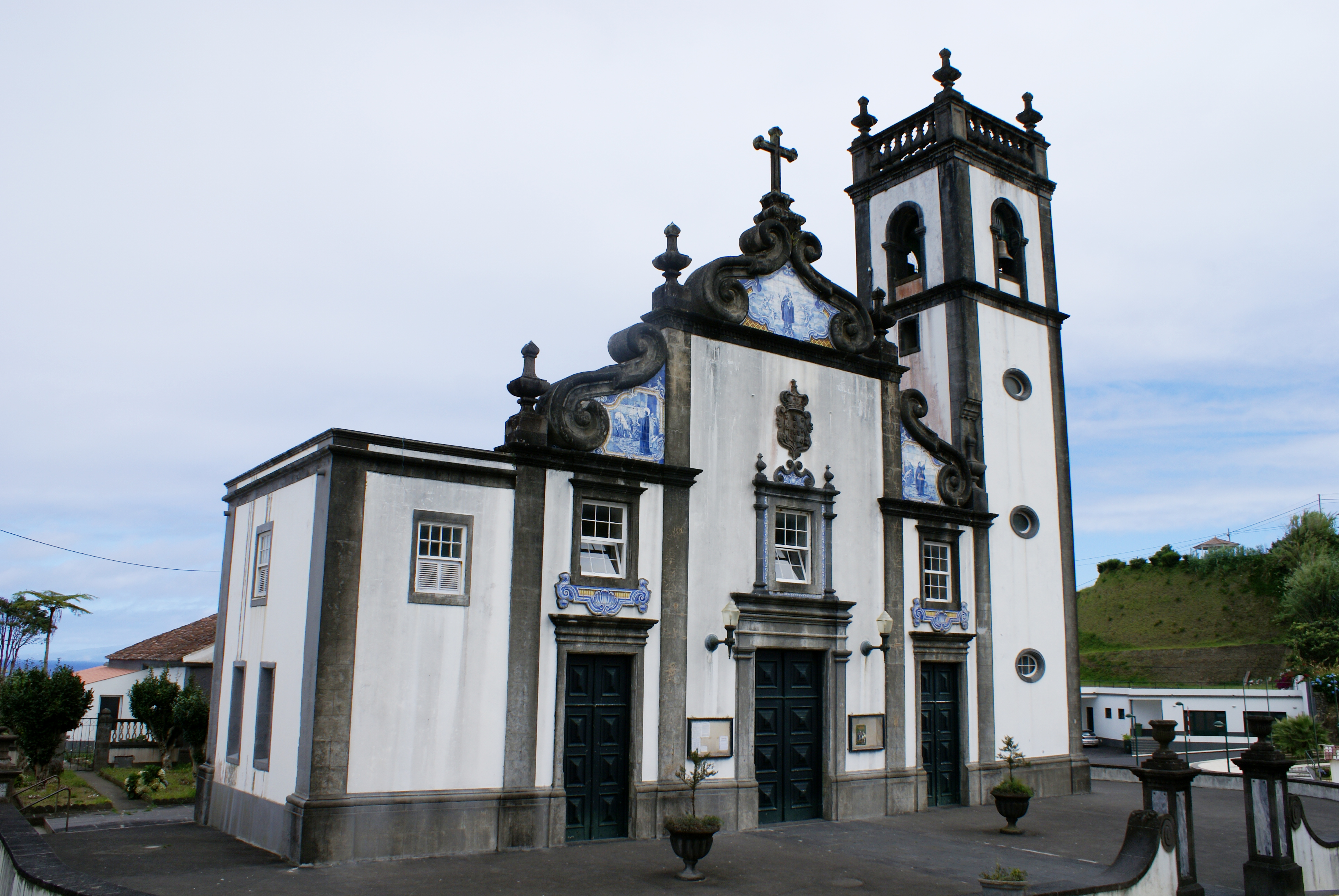 Igreja de Santo António, Santo antónio, Ponta Delgada, ilha de São Miguel, Açores